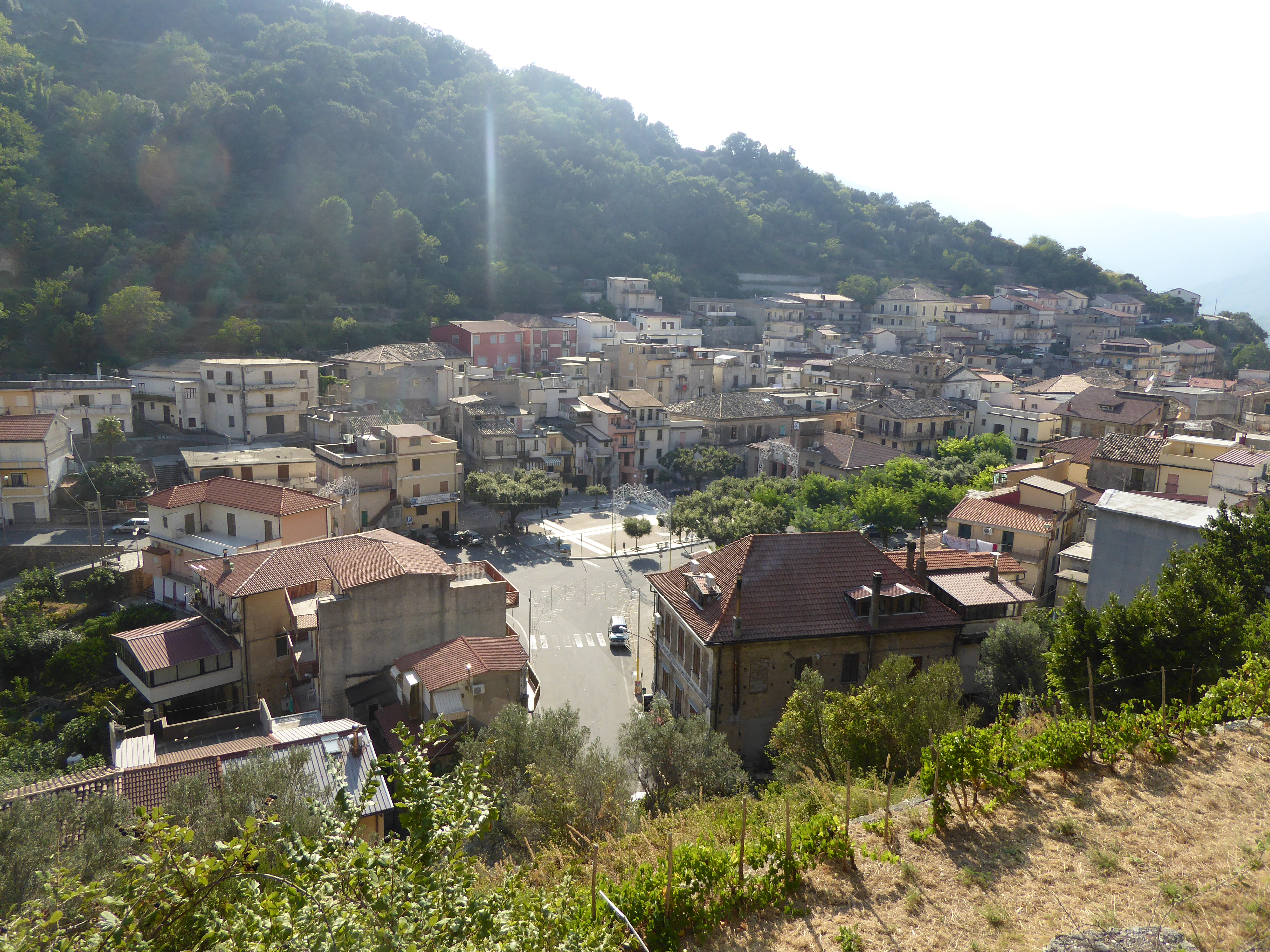 Pazzano vista dal Monte Consolino (agosto 2019)